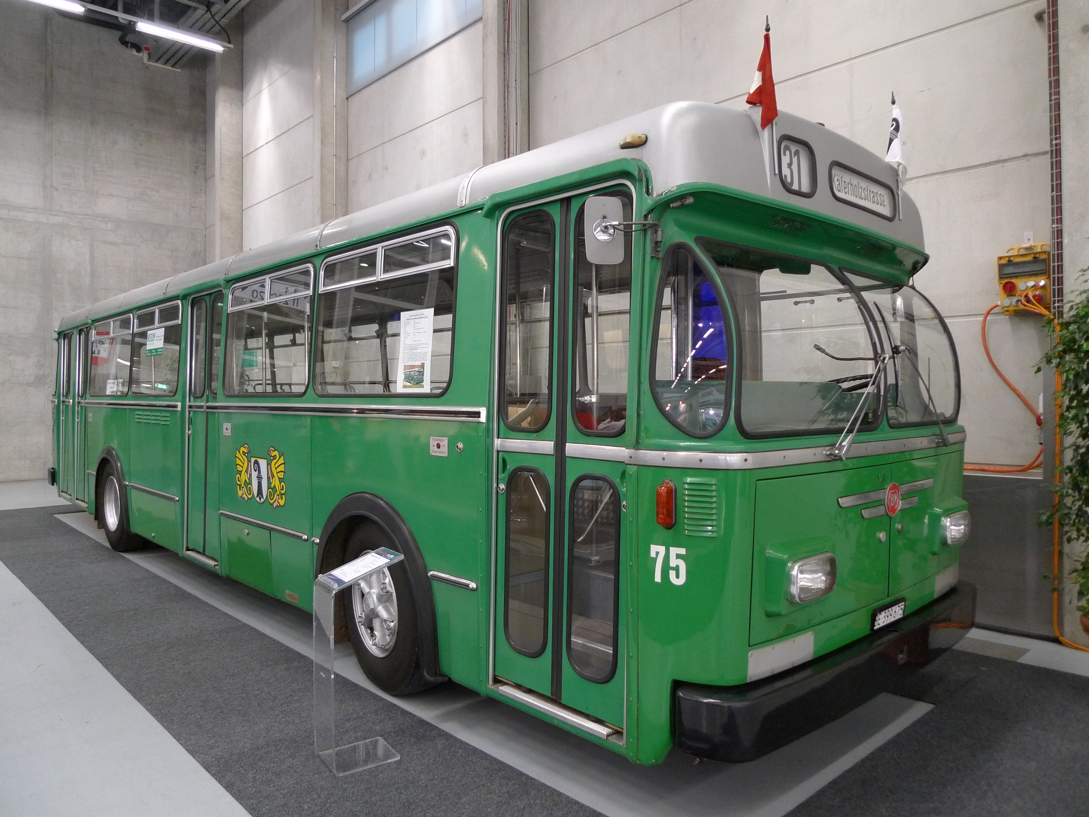 FBW / Frech & Hoch Autobus B 51U/54L, Baujahr 1969, Motor EDU, Sitzplätze 28, Stehplätze 35. Im Einsatz in Basel (Schweiz) 1969-2000.